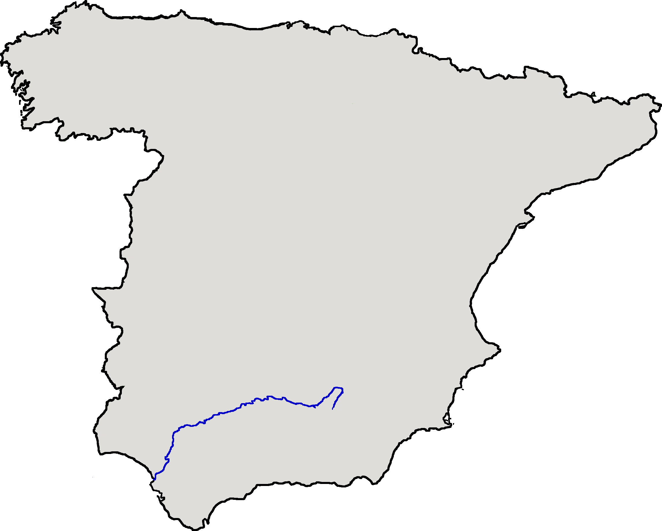 Localización del río Guadalquivir respecto de la España peninsular